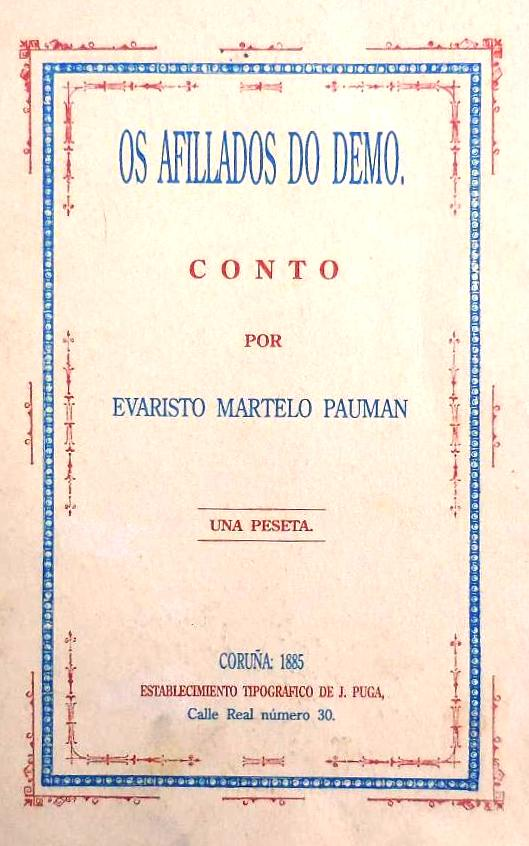 Os afillados do demo